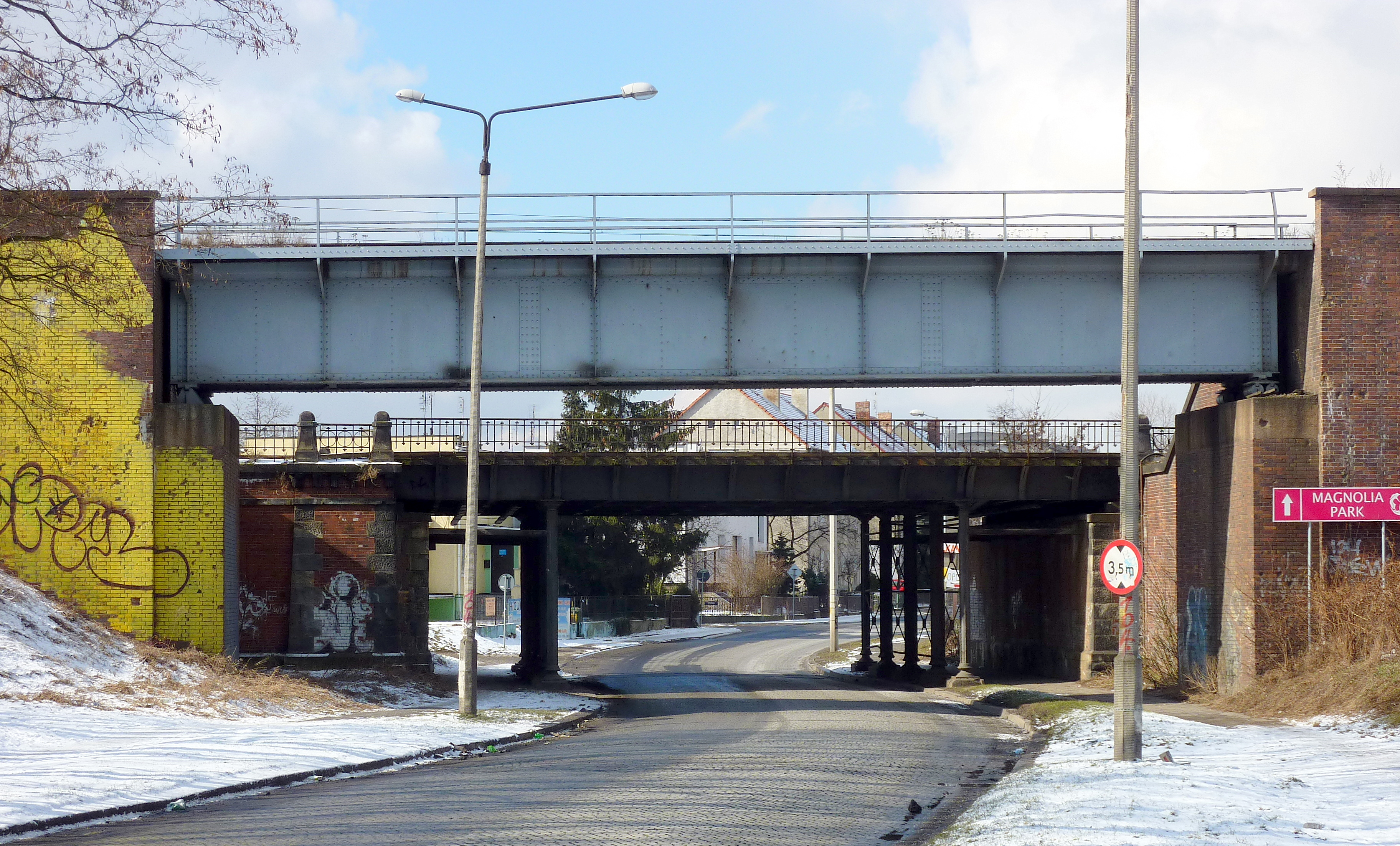 Wiadukt kolejowy nad ul. Inżynierską we Wrocławiu.